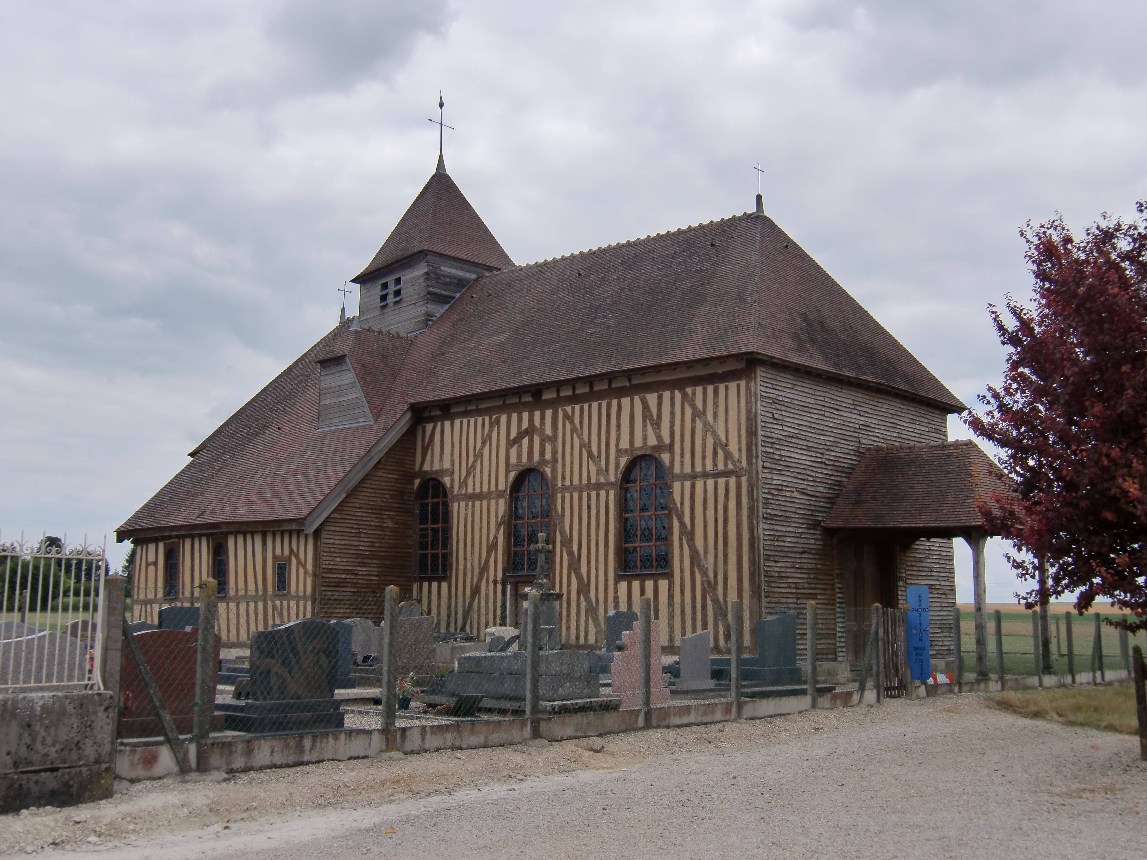 Eglise de Saint-Léger-sous-Margerie (Aube - Champagne - France) édifice à pans de bois de la région du Der